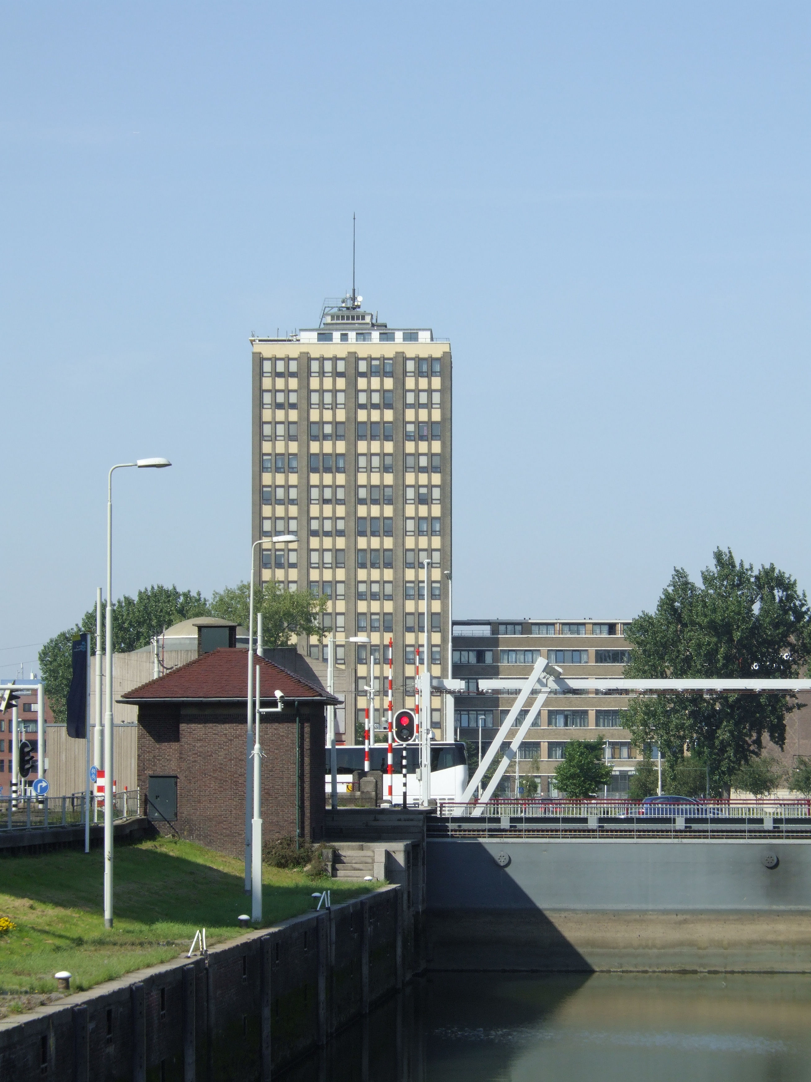 GEB-gebouw Rotterdam, 10 september 2006 Categorie:Afbeelding bouwwerk Rotterdam